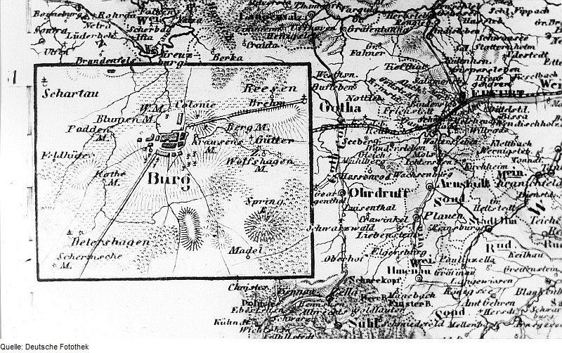 Original image description from the Deutsche FotothekBurg b. Magdeburg. Karte, aus: Meyers Atlas von Deutschland, 1850, Blatt Provinz Sachsen, gez. 1849